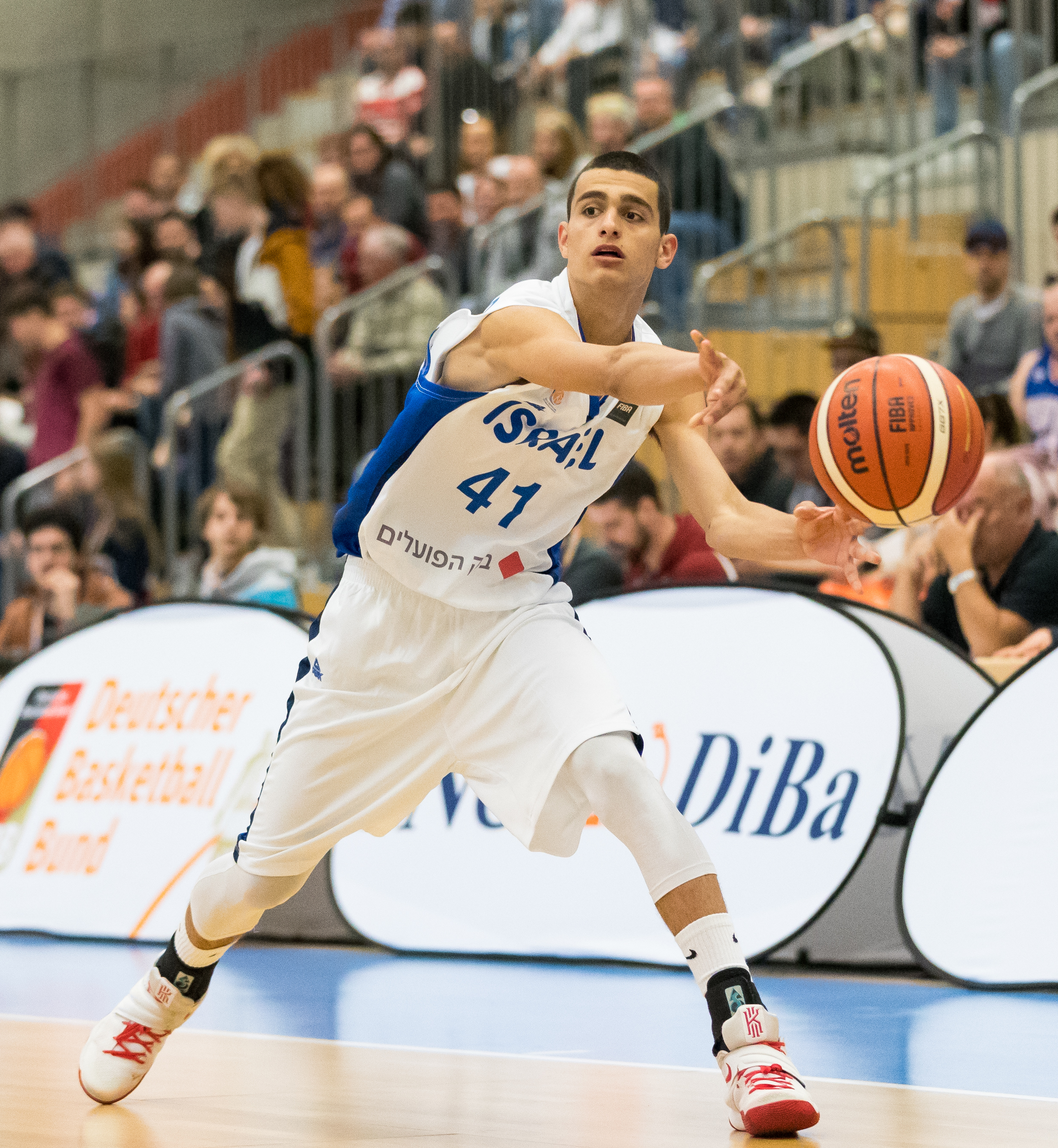 Israel vs Argentinia 106:83 during Basketball Albert Schweitzer Turnier at GBG Halle, Mannheim, Baden-Württemberg, Germany on 2018-04-02, Photo: Sven Mandel